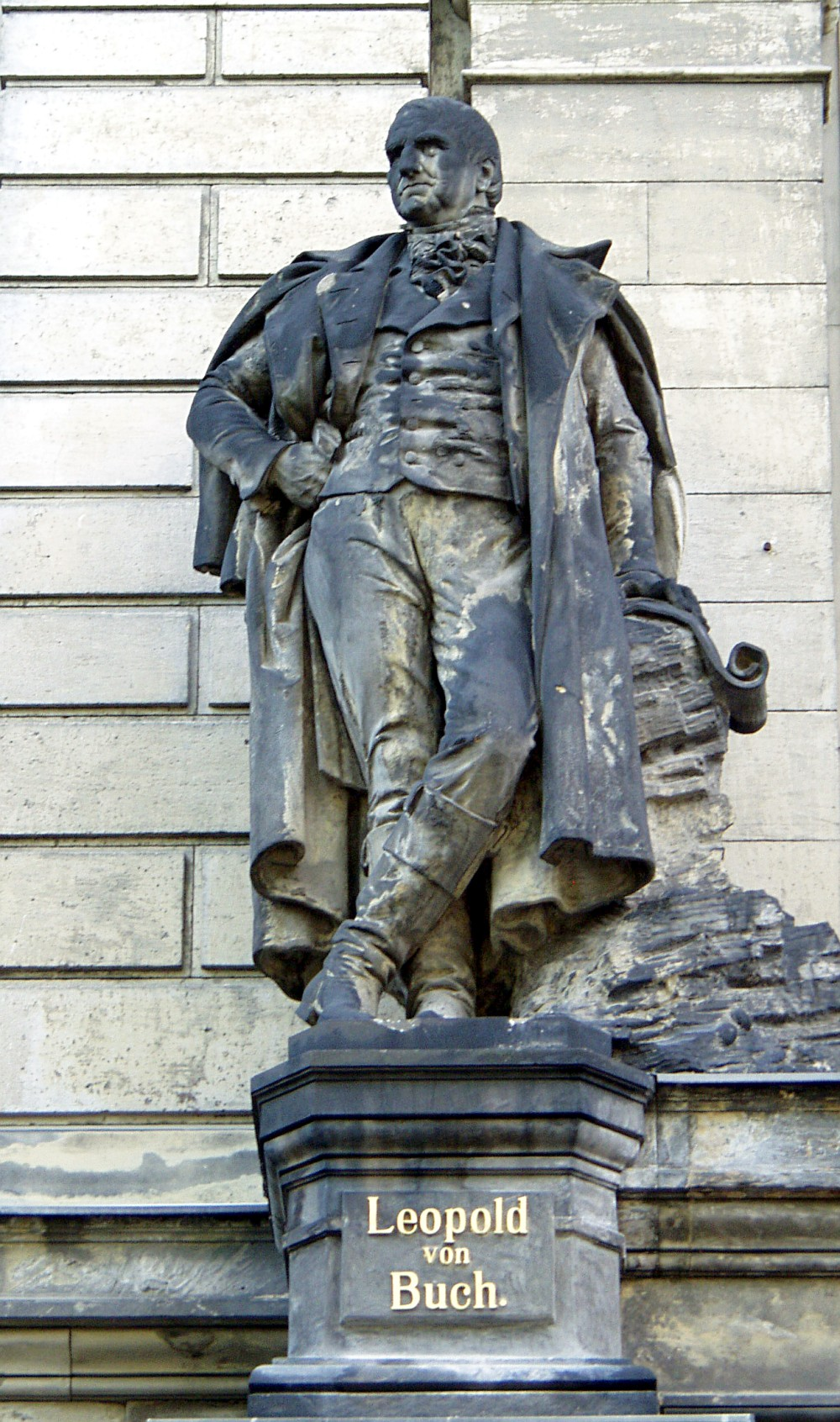 Statue des Leopold von Buch über dem Eingang des Naturkundemuseum, Berlin. Bildhauer: Richard Ohmann